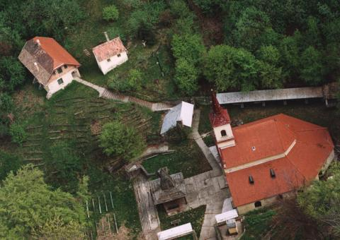 Csatka, Hungary, aerial photography. Szentkúti Kisboldogasszony római katolikus templom